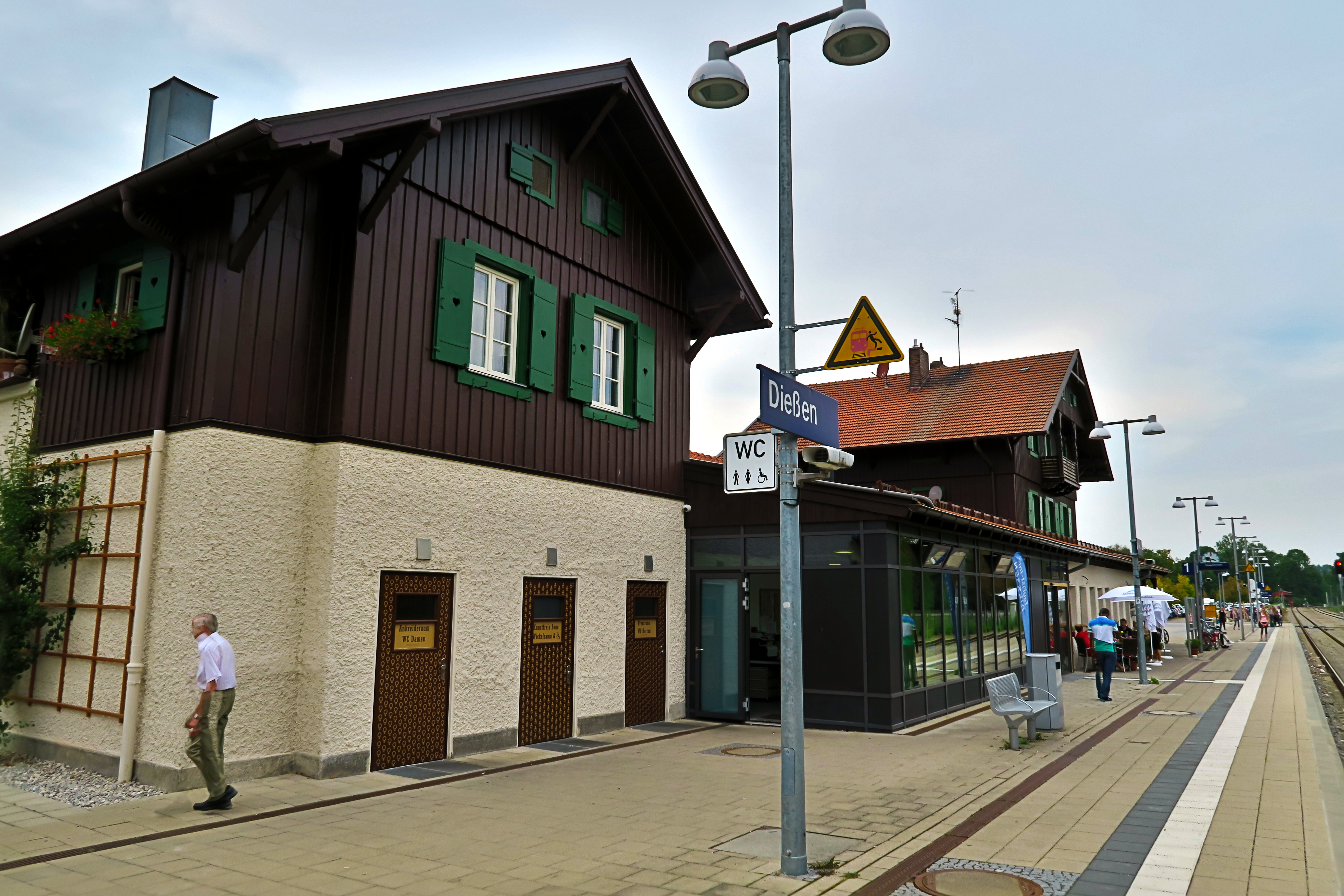 Deutschland, Bayern, Oberbayern, Landkreis Landsberg am Lech, Dießen Bahnhof